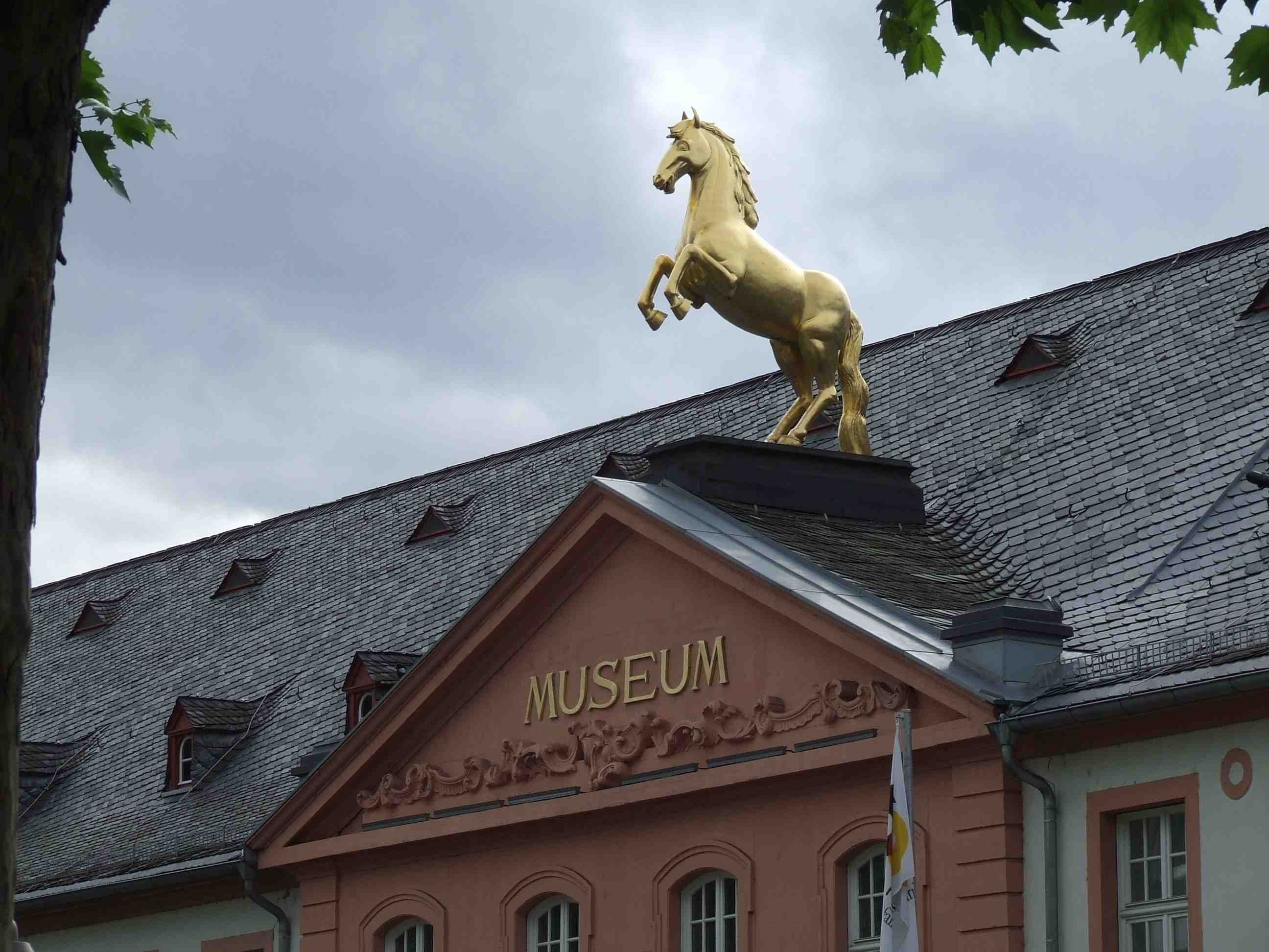 Landesmuseum Mainz in Mainz